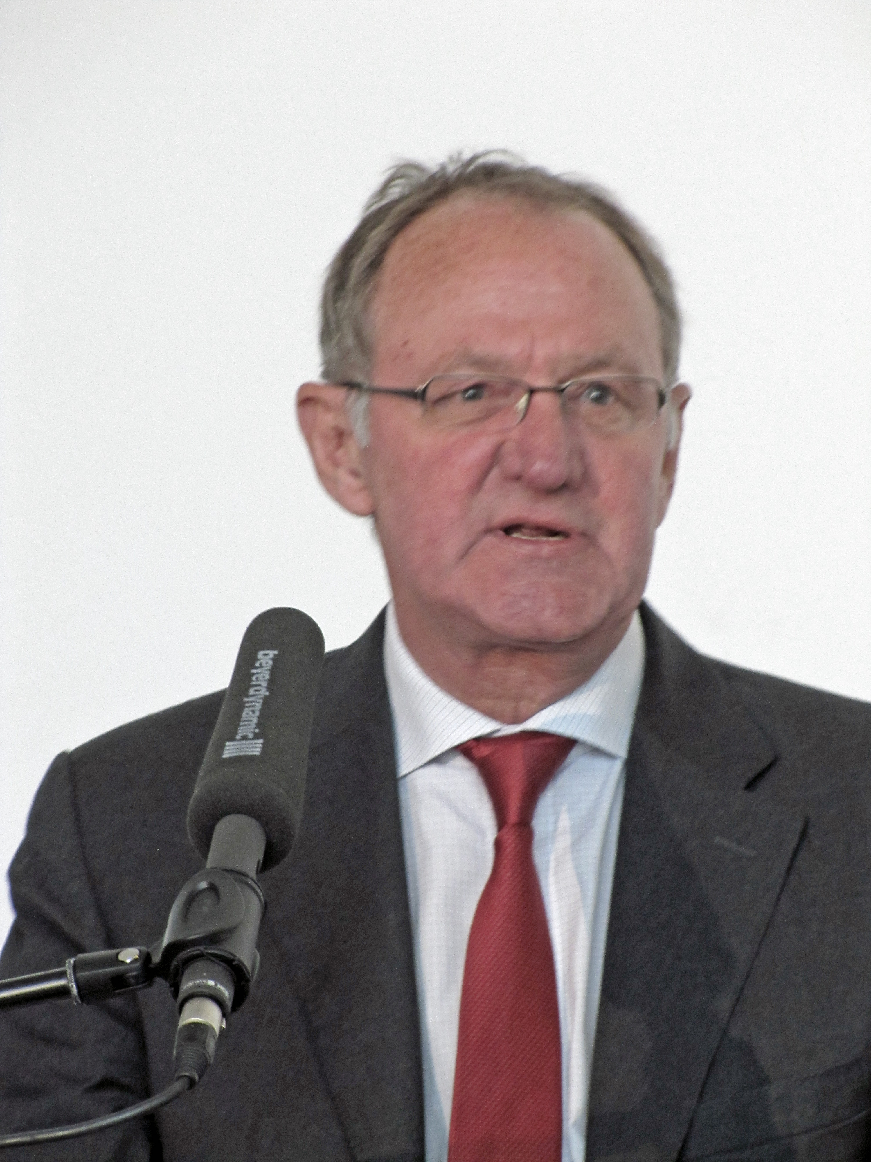 Friedrich Wilhelm Graf, evangelischer Theologe und emeritierter Professor. Vortrag: "Glaube und Gewalt: Sind Religionen zivilisierbar?"